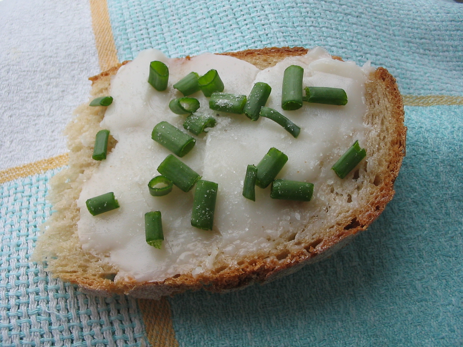 бутерброд, скибка житнього хліба зі смальцем та зеленою цибулею